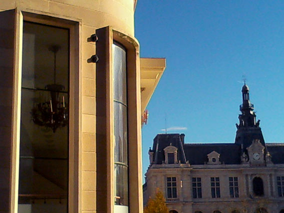 Détail du théâtre de Poitiers avec l'hôtel de ville en fond.